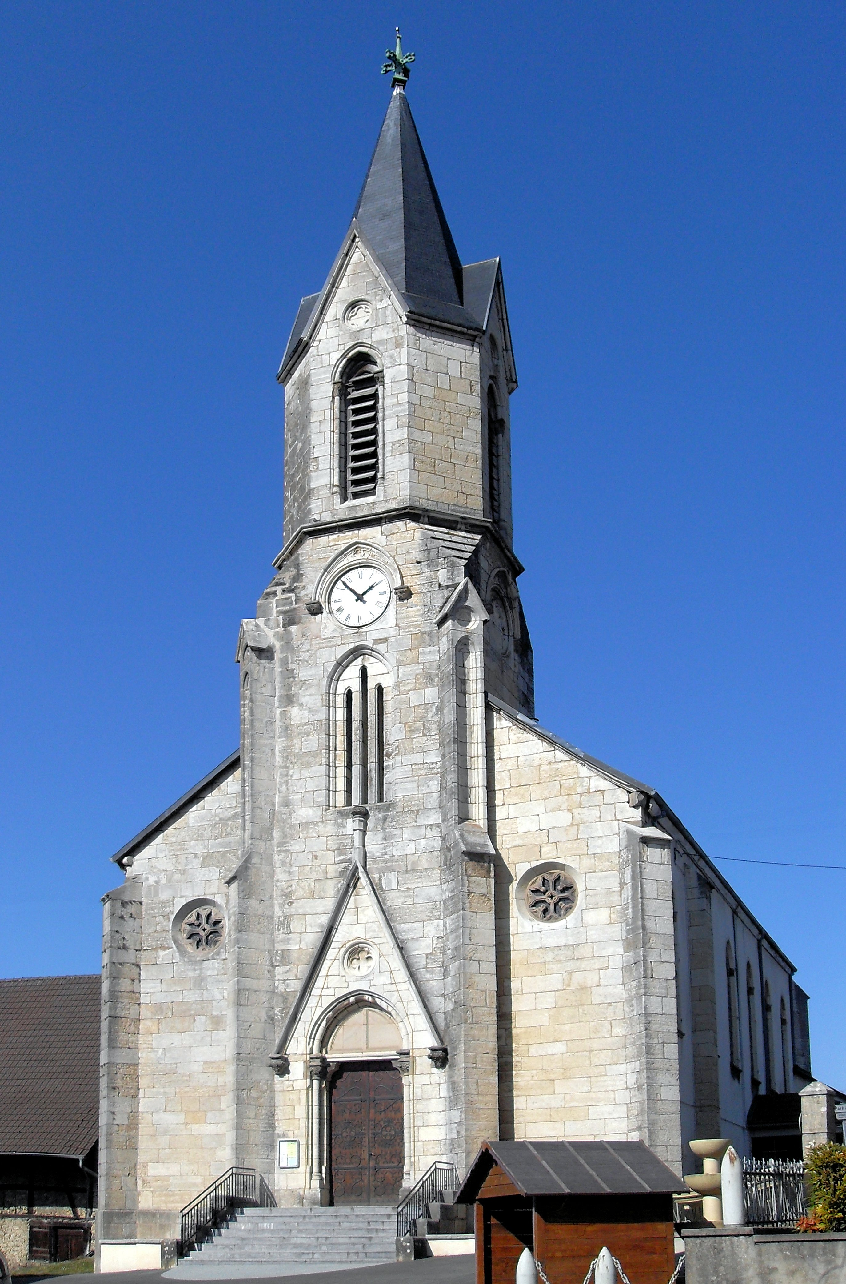 L'église Saint-Valère à Fêche-l'Église